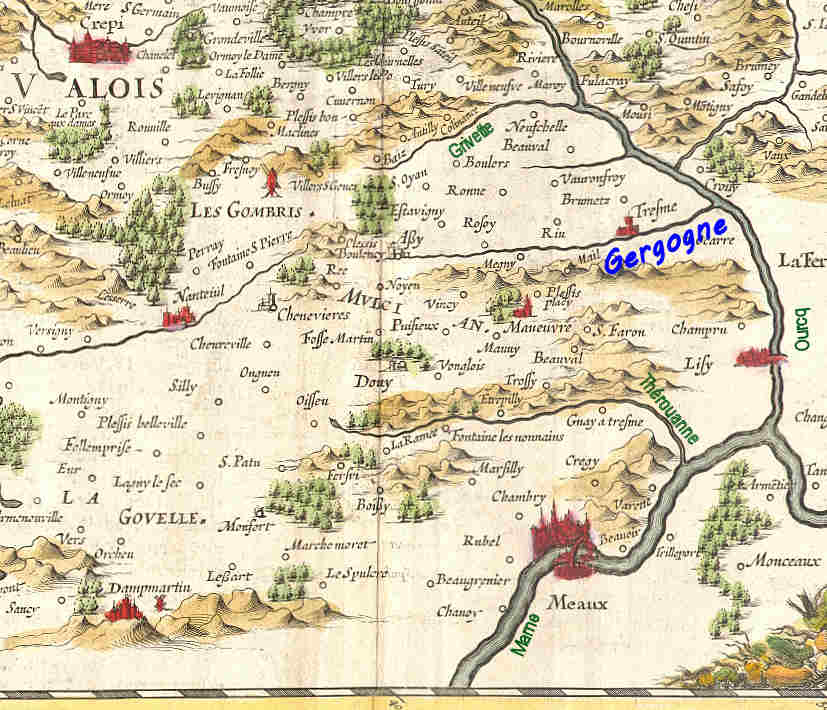 La Gergogne, en 1620, en pays de Multien, entre Grivette et Thérouanne, au pied du Valois